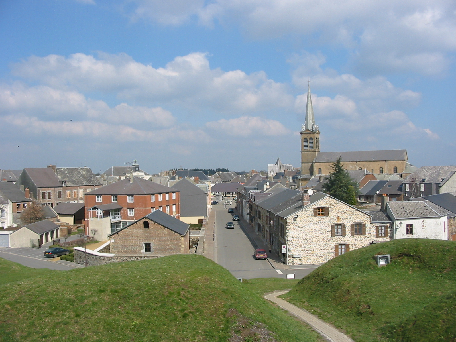 Rocroi (French Ardennes)